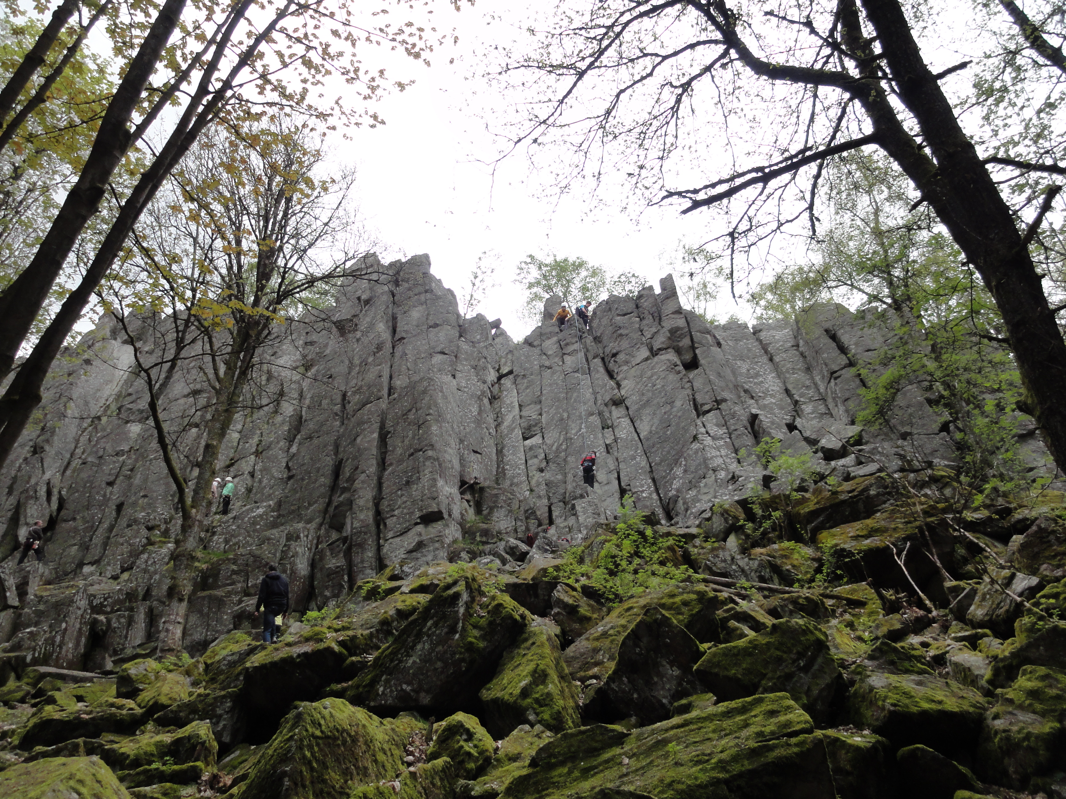 Phonolith-Felswand „Steinwand“ in der Nähe des Dorfes Steinwand, gelegen im Naturpark Hessische Rhön und im Biosphärenreservat Rhön